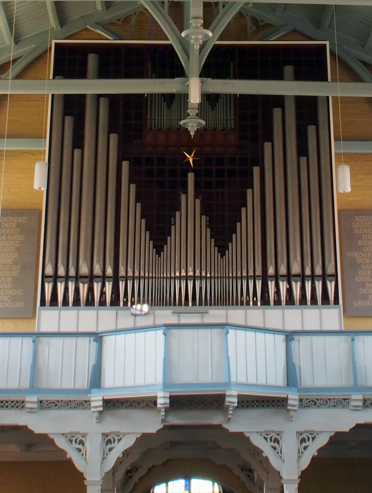 Orgel der Großen Kreuzkirche in Hermannsburg, Niedersachsen, Germany, 2008 von Orgelbauer Alexander Schuke aufgestellt